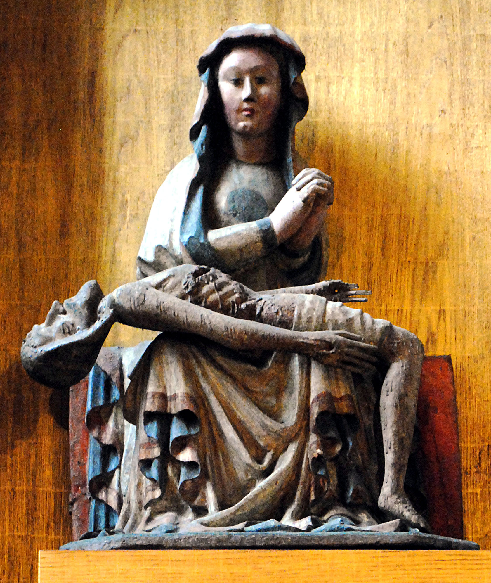 Pieta, Gnadenbild, Maria im Weingarten, Volkach